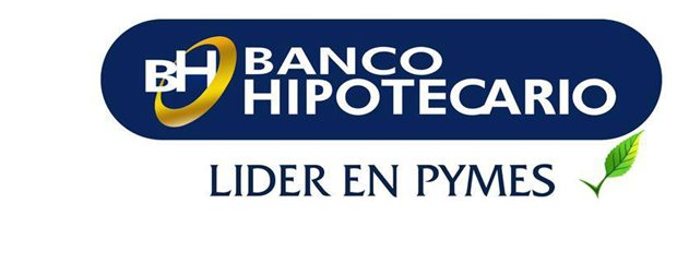 Logo Banco Hipotecario de El Salvador